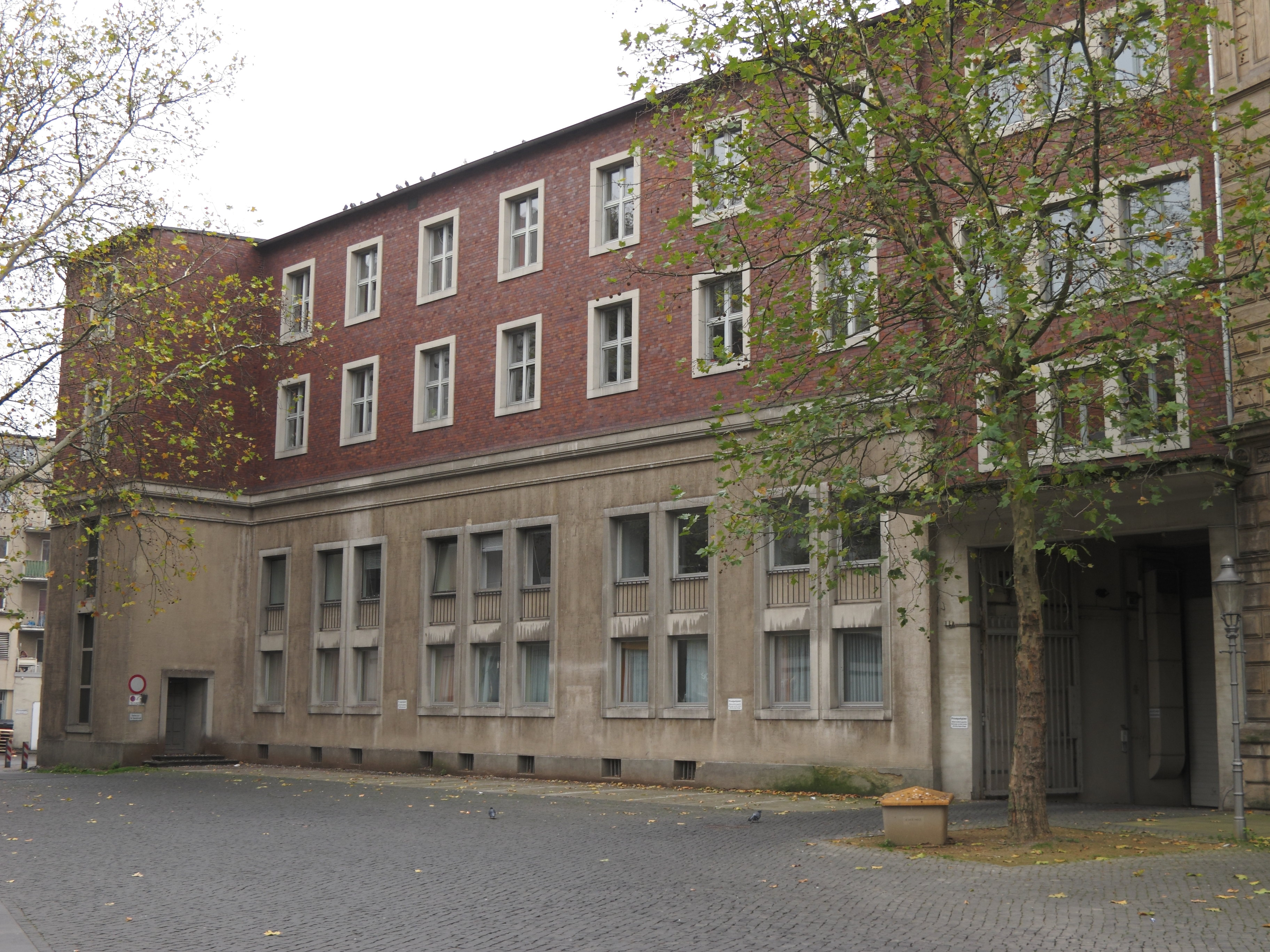 Braunschweig, Bunker Münzstraße. Der Bunker wurde 1941 errichtet. Nach 1945 wurde er "entfestigt" und zu einem Verwaltungsgebäude der Polizei umgebaut. Seit 2002 ist er ungenutzt.